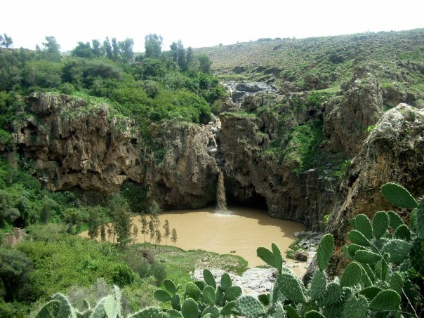 Waterfall on the Geba river, south of the village of Romanat (which is located on the road from Mekelle to Abi Addi).